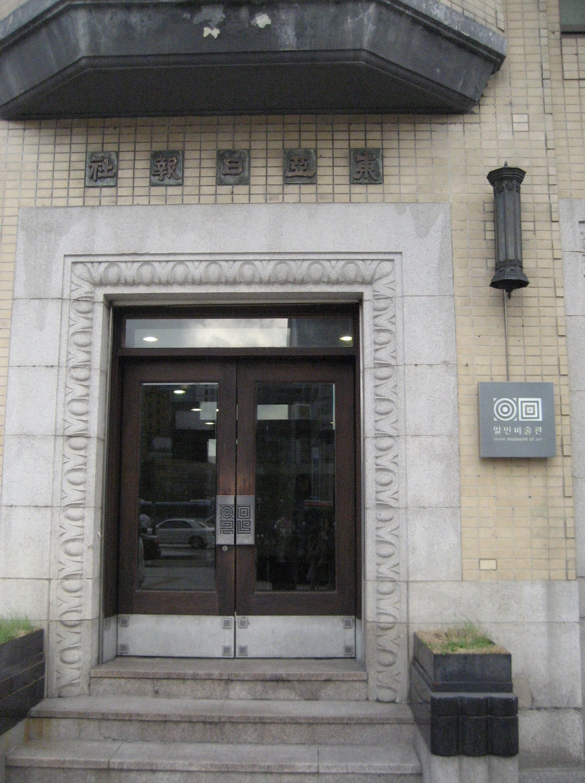 東亜日報本社入口 (Seoul)